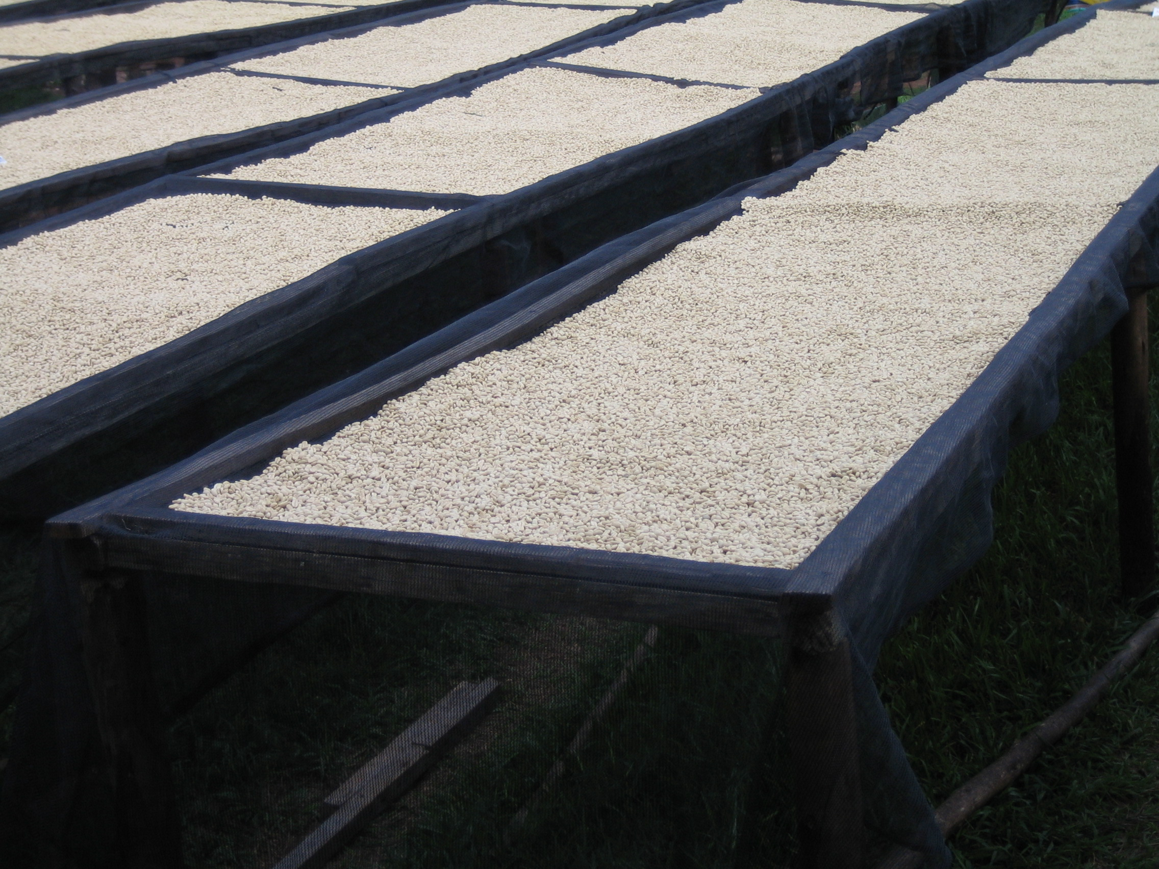 Taken by SteveRwanda